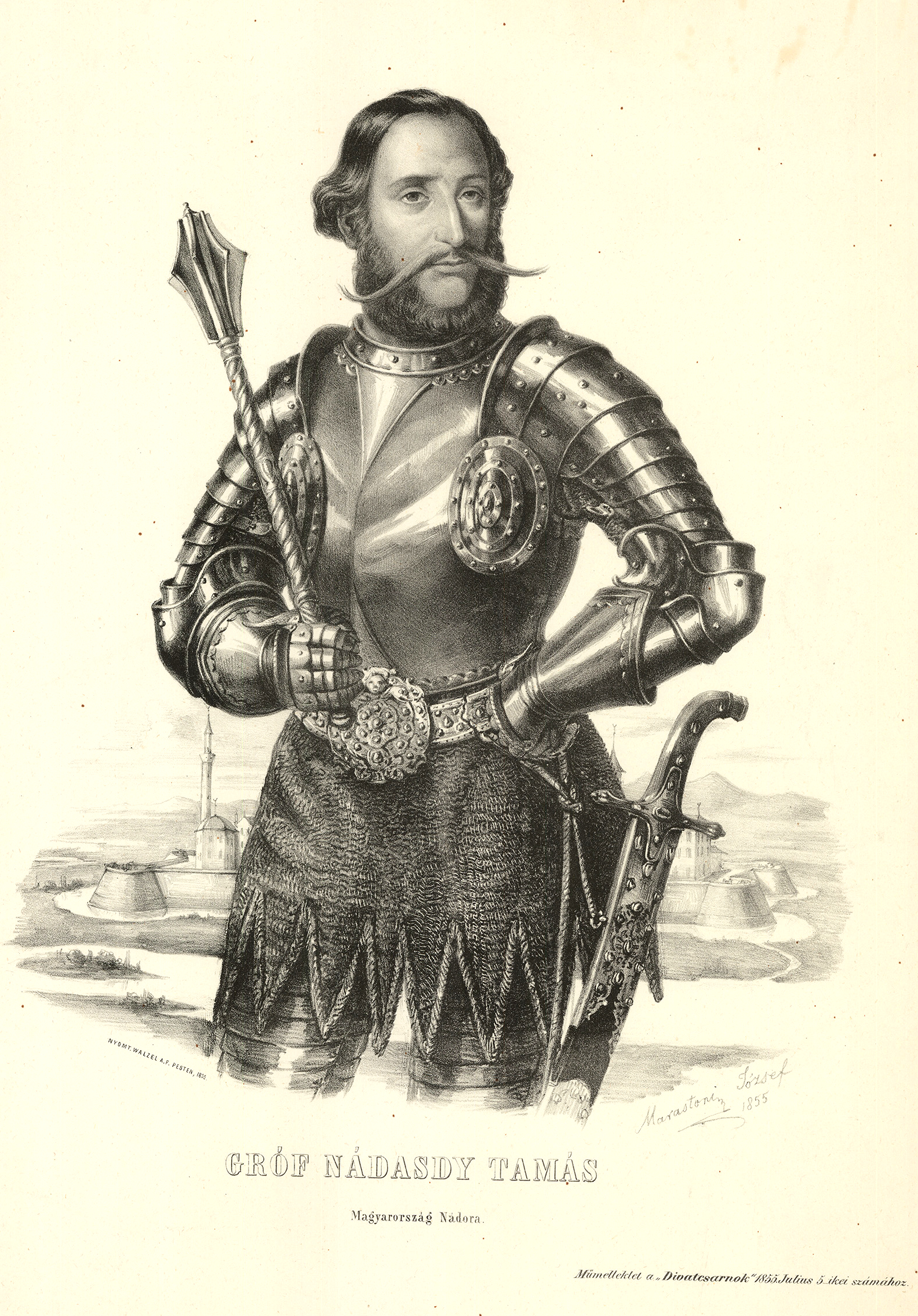 Nádasdy Tamás (1498–1562) nádor portréja